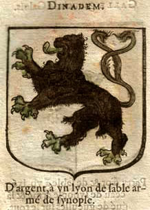 Dinadem